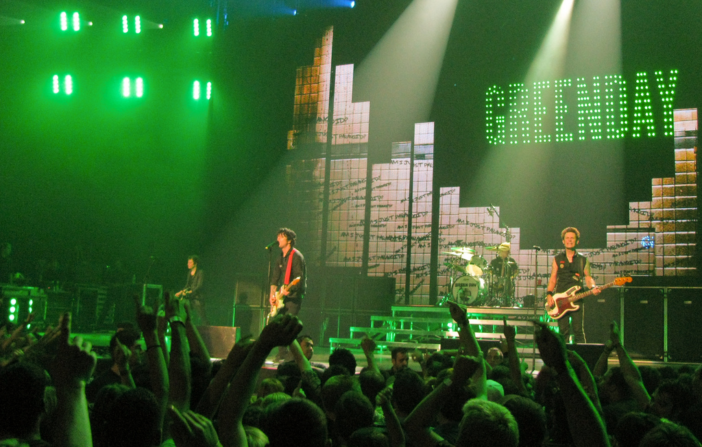 Foto d'un concierto del grupo Green Day